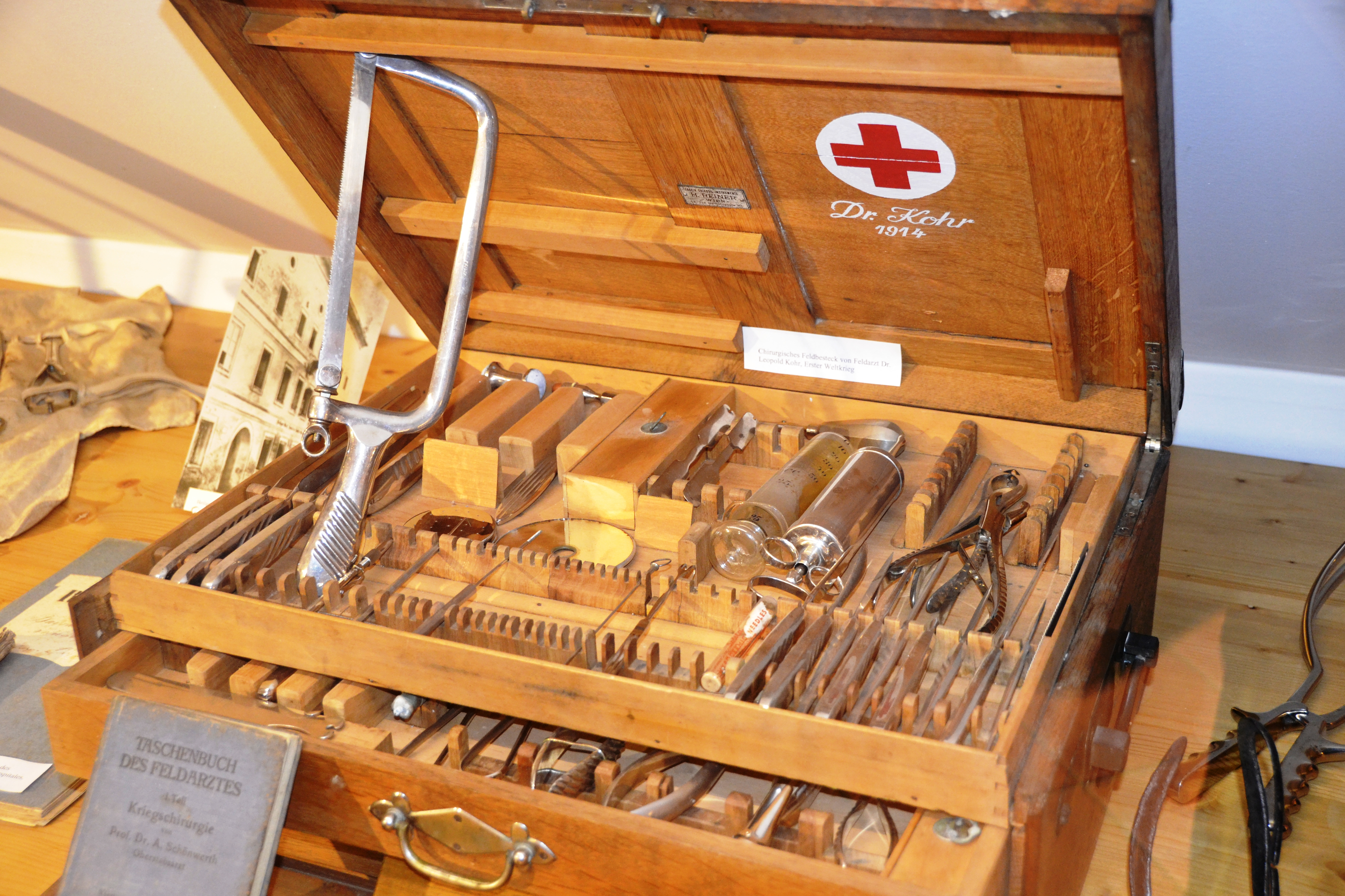 Feldchirurgisches Besteck aus dem Ersten Weltkrieg im Heimatmuseum Oberndorf bei Salzburg.